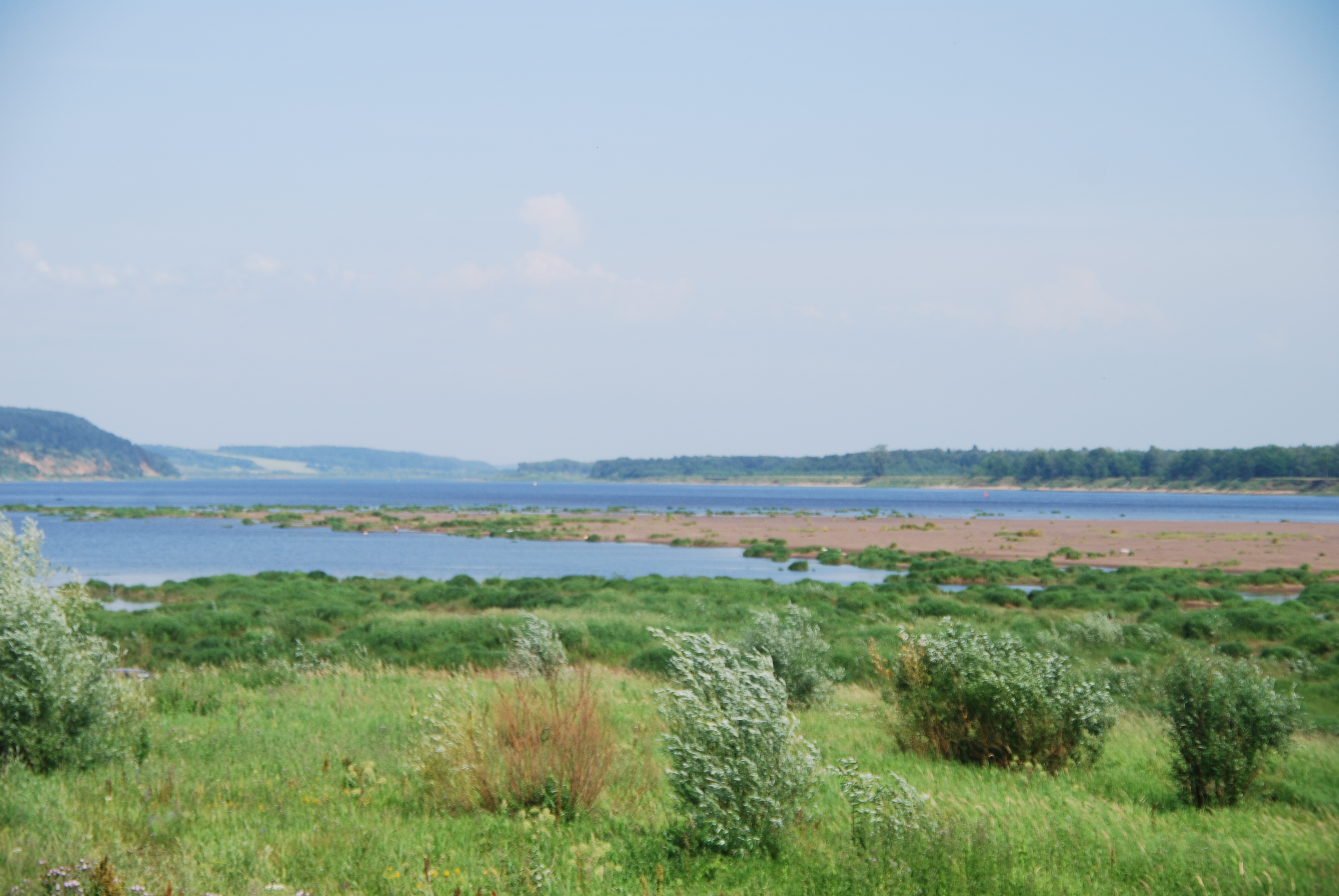 Нечкинский, Воткинский район На фото изображена река Кама This image is related to the protected area of Russia number 1800028